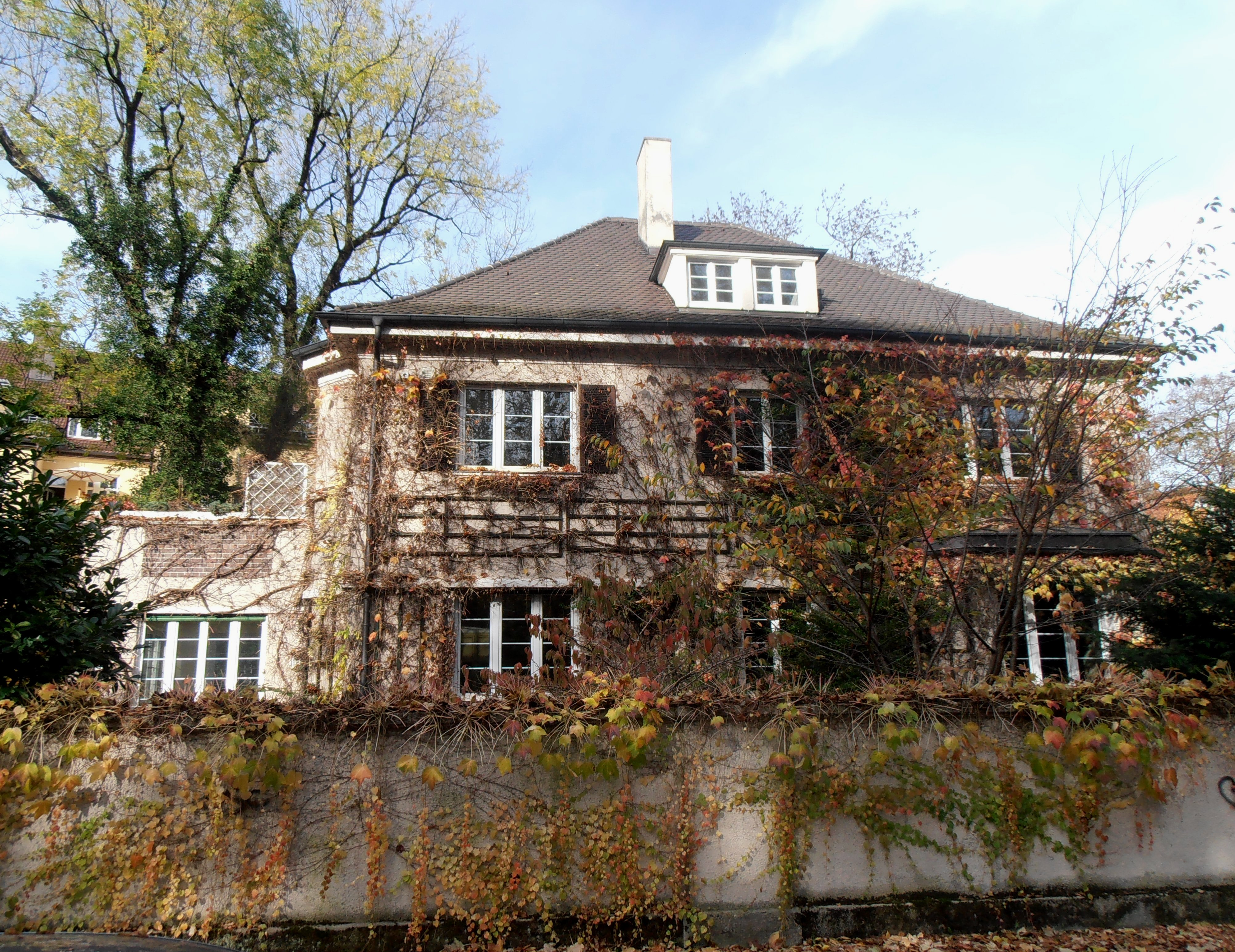 Kolbergerstr. 5, Walmdachvilla